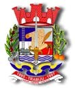 Brasão_do_Municipio_de_Trabiju-SP